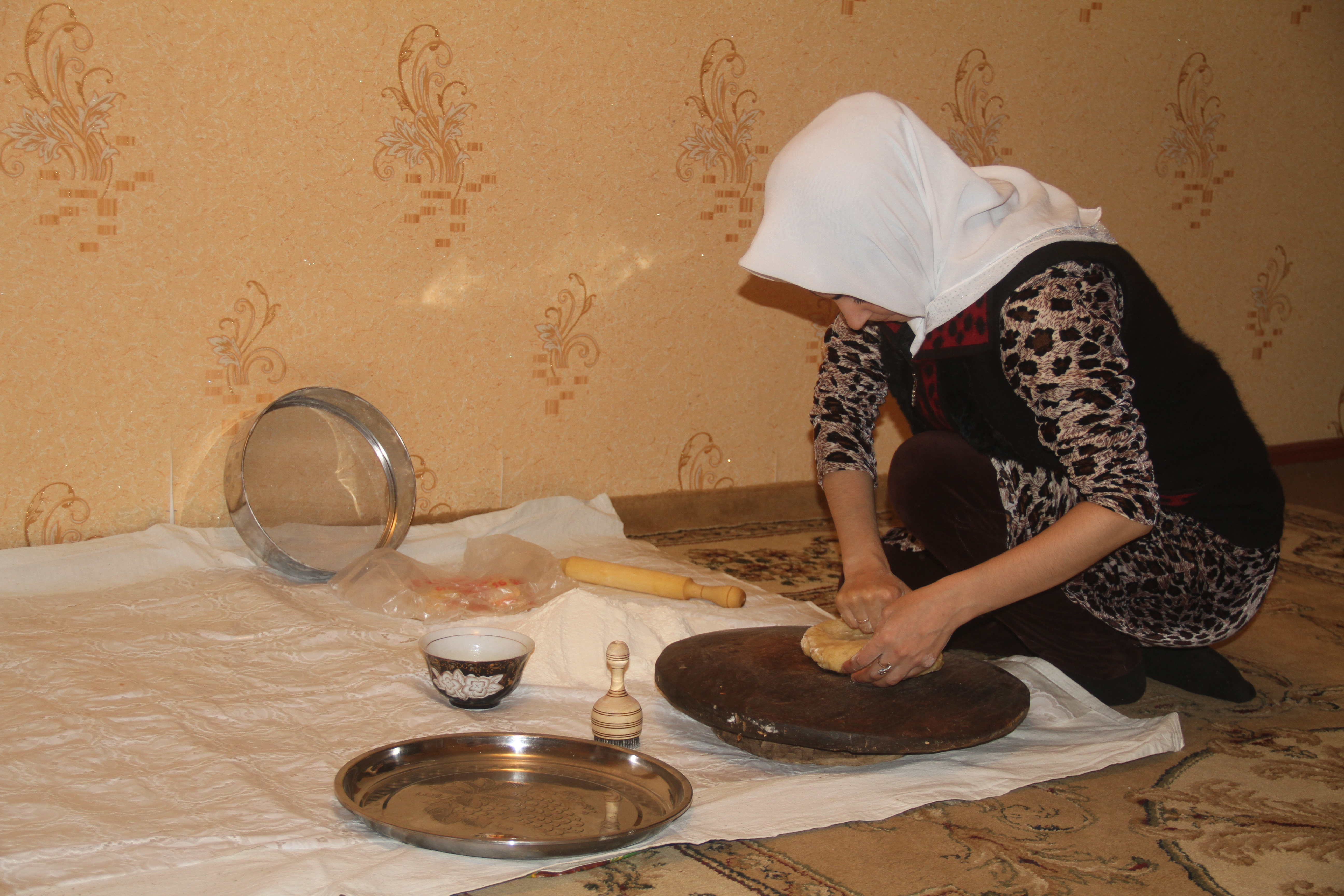 Тоҷикӣ: Орзуқ (3)